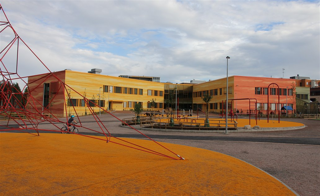 Aurinkokiven koulu on Vantaan Kivistön suuralueen Kivistön kaupunginosassa syksyllä 2016 aloittanut suomenkielinen alakoulu (luokka-asteet 1–6). Vielä keväällä 2016 lähistöllä toimineen Kivistön koulun oppilaat siirtyväät tällöin kuvassa näkyvään uuteen kouluunsa Aurinkokiven palvelukeskuksessa. Rakennuksen muissa haaroissa toimivat muun muassa päiväkoti ja neuvola.